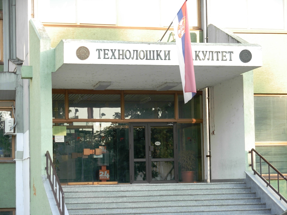 Tehnoloski fakultet Univerziteta u Novom Sadu